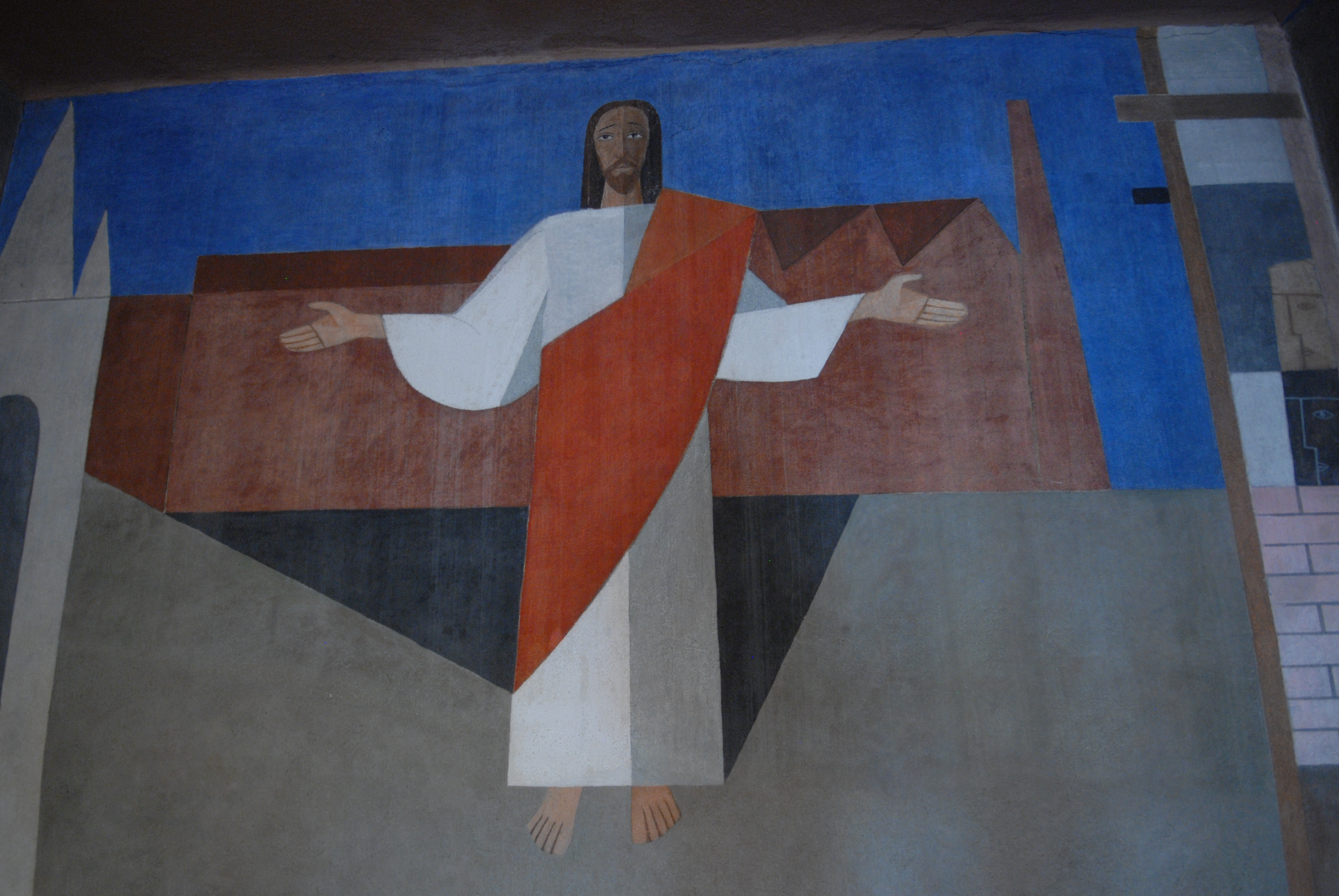 Jesus Cristo em mural central do altar da Capela do Cristo Operário, feito por Alfredo Volpi